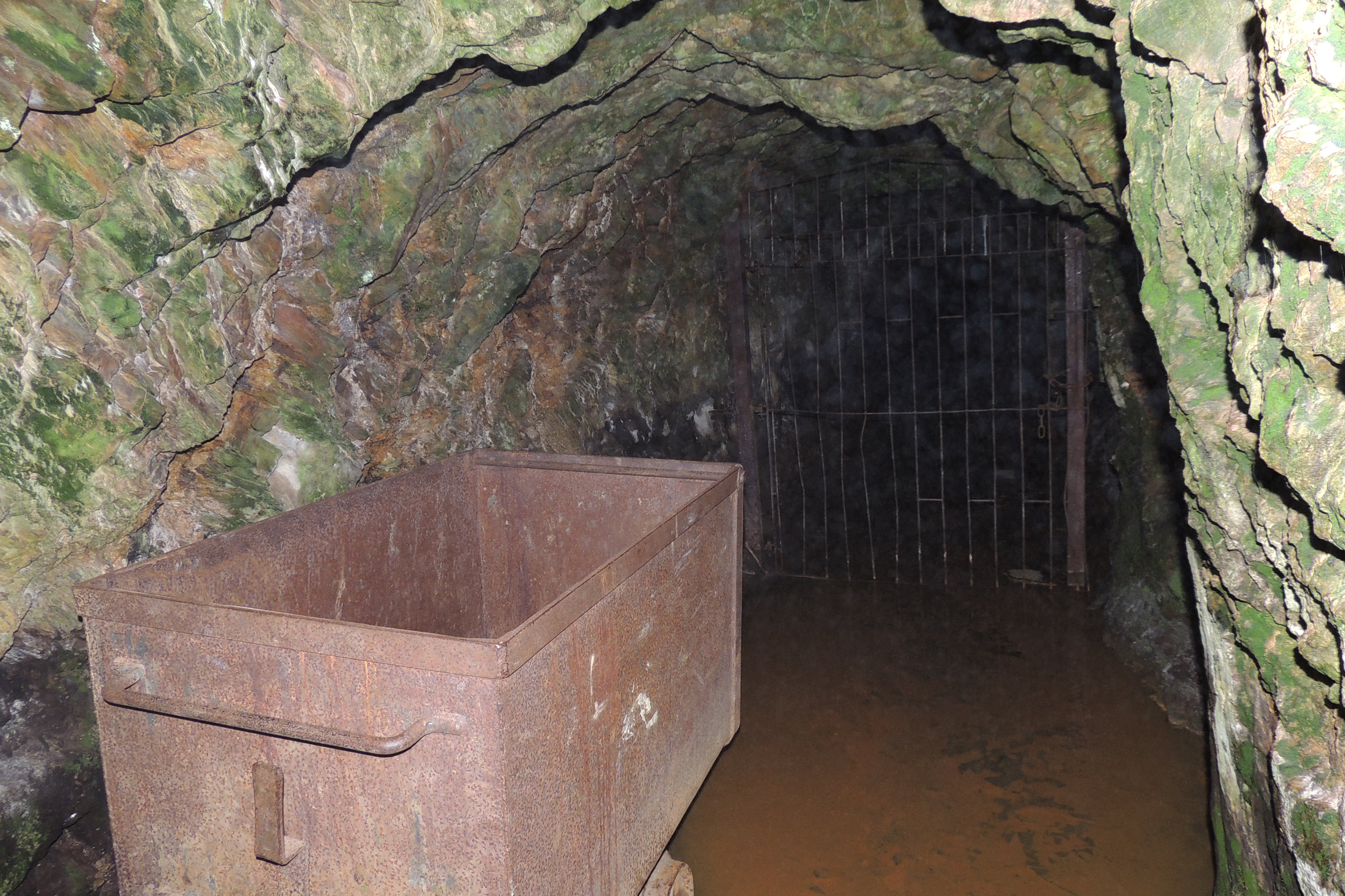 La Carolina, San Luis, Argentina